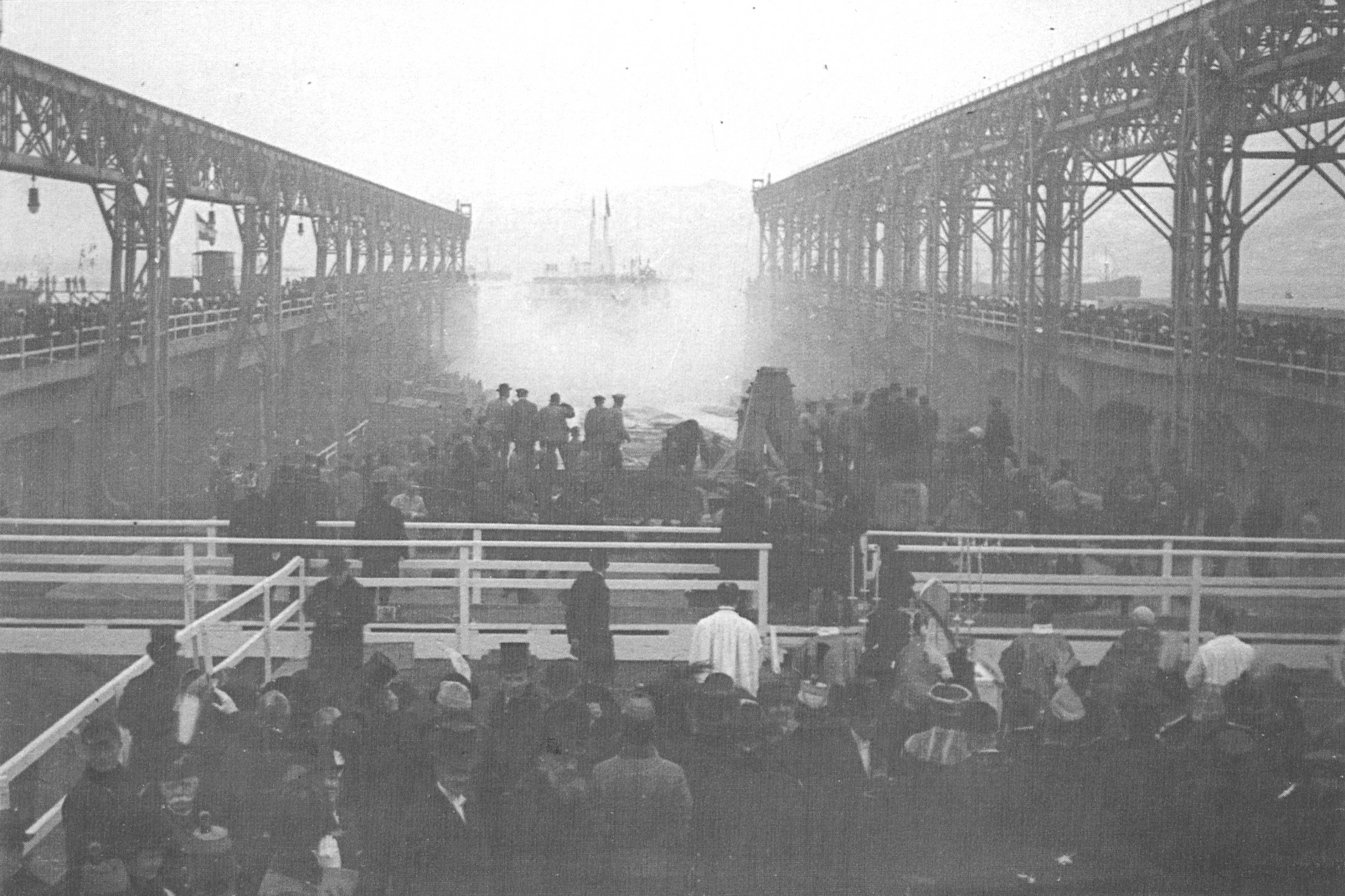 Stapellauf des Schlachtschiffes (Dreadnought) SMS Szent István in der Danubius-Werft in Fiume (now Rijeka)